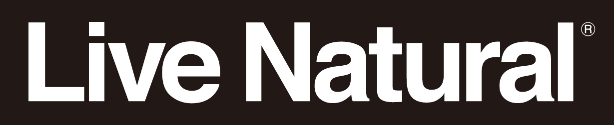 ライブナチュラルロゴ